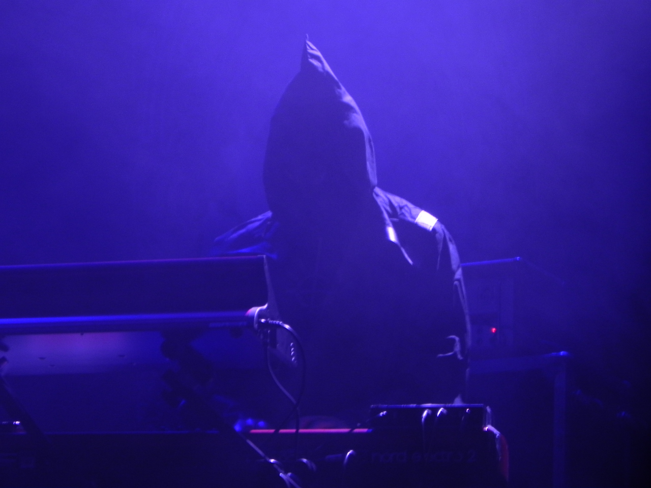 Ghost live at Roskilde Festival 2011.